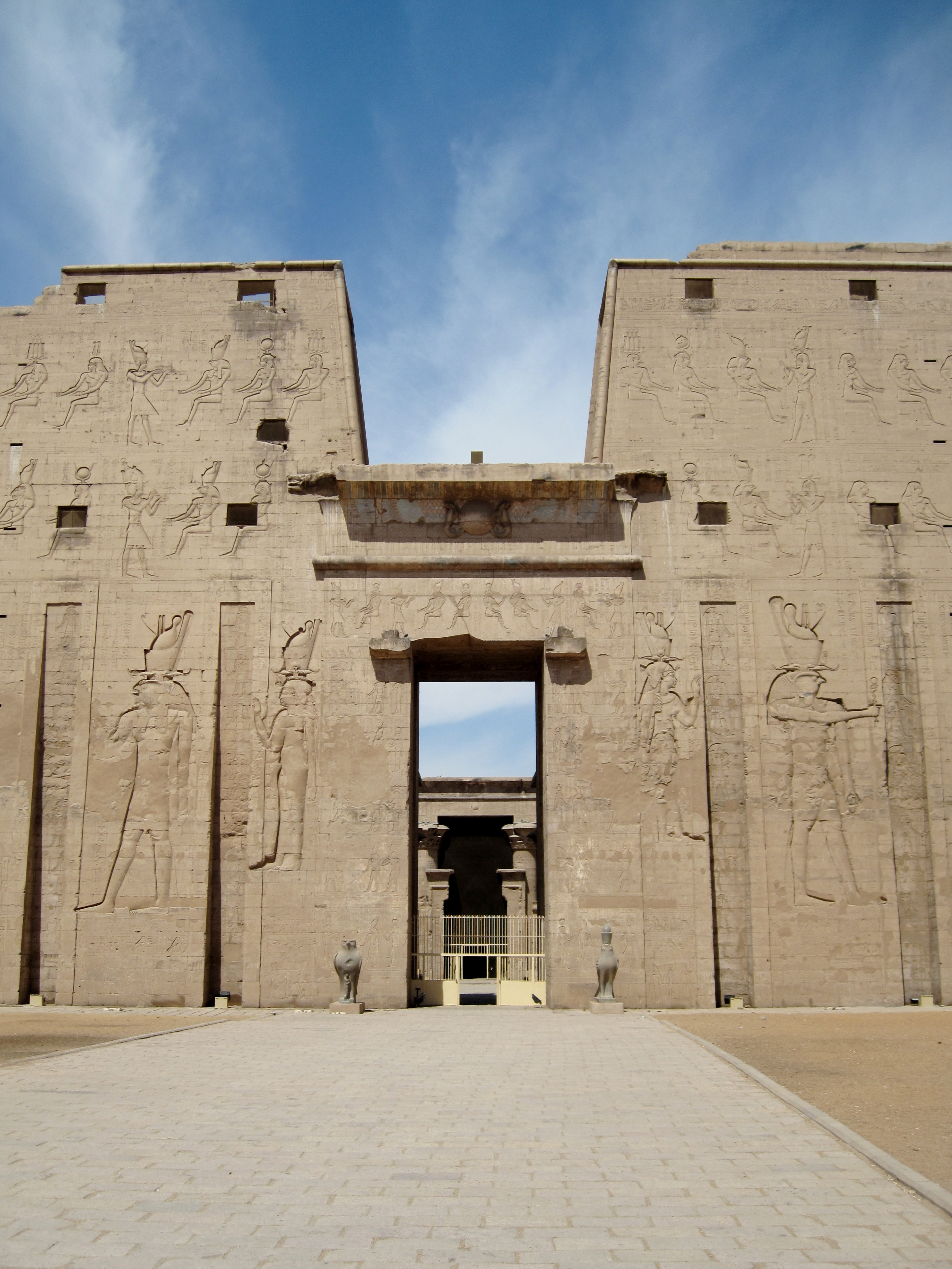 Portal im Pylon des Tempels von Edfu, Ägypten